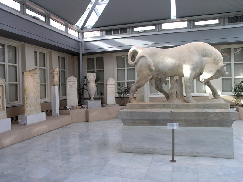 Atrium du Musée archéologique du Céramique d'Athènes avec le Taureau de l'enclos funéraire de Dionysios de Kollytos, près de la Voie des Tombes. Le taureau prenait place sur un haut piédestal au milieu de l'enclos, derrière un naïskos sur lequel étaient gravés le nom du défunt, Dionysios fils d'Alphinos, du dème de Kollytos, près du Céramique, et qui vécut aussi sur l'île de Samos, où il servit de trésorier de l'Héraion en 346/345. Vers 345-340 av. J.-C. Musée archéologique du Céramique, n° P 689.